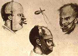 Autenrieth'sche Maske: Variante des Knebels, die von Johann Heinrich Ferdinand Autenrieth erfunden wurde